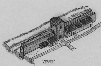 Rekonstruktionsversuch der Kastellmauer und der Innenbebauung in Pfyn/Ad Fines (CH)